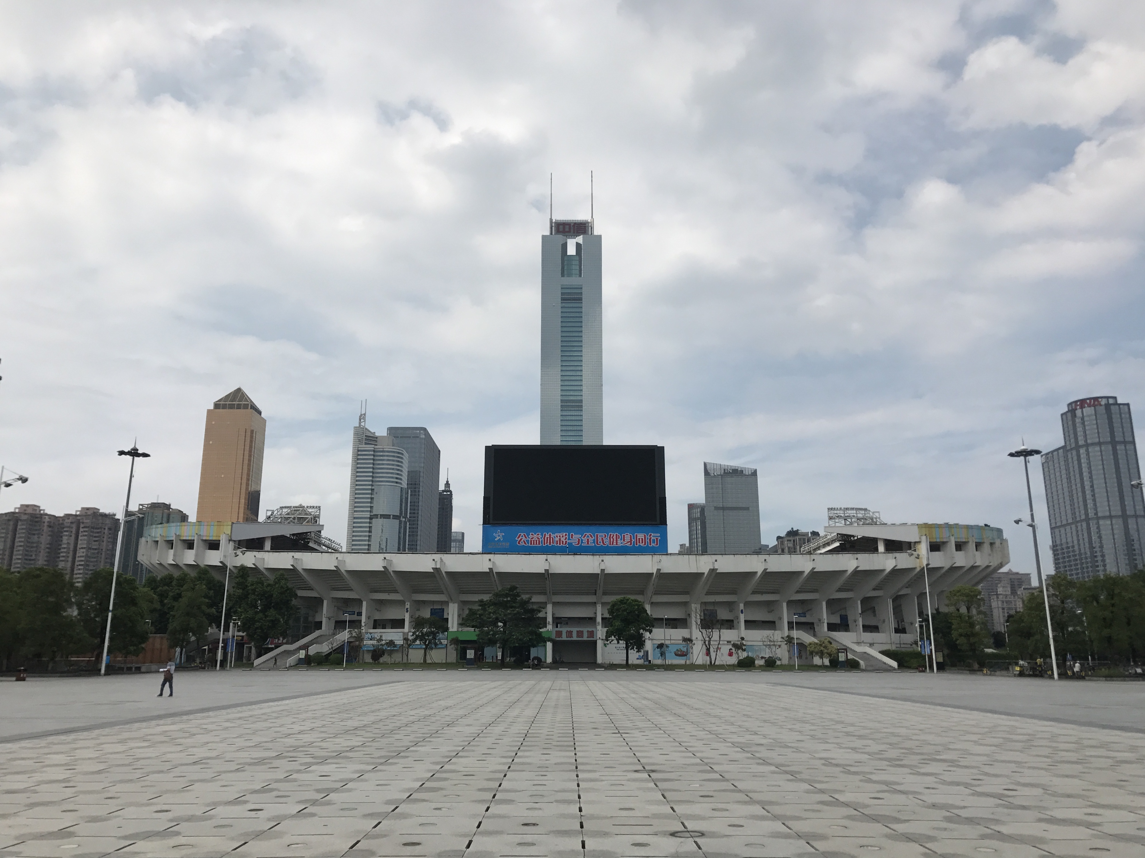 天河体育中心体育場とCITICプラザ